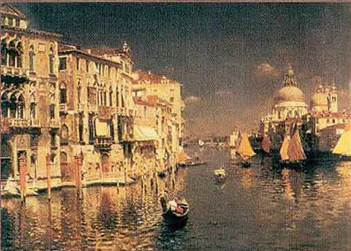 (aus der englischen Wikipedia) image:FelixZiempainting.jpg